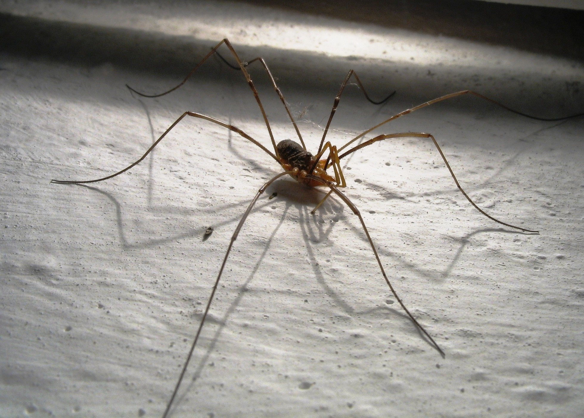 Kosarz pospolity (Phalangium opilio)